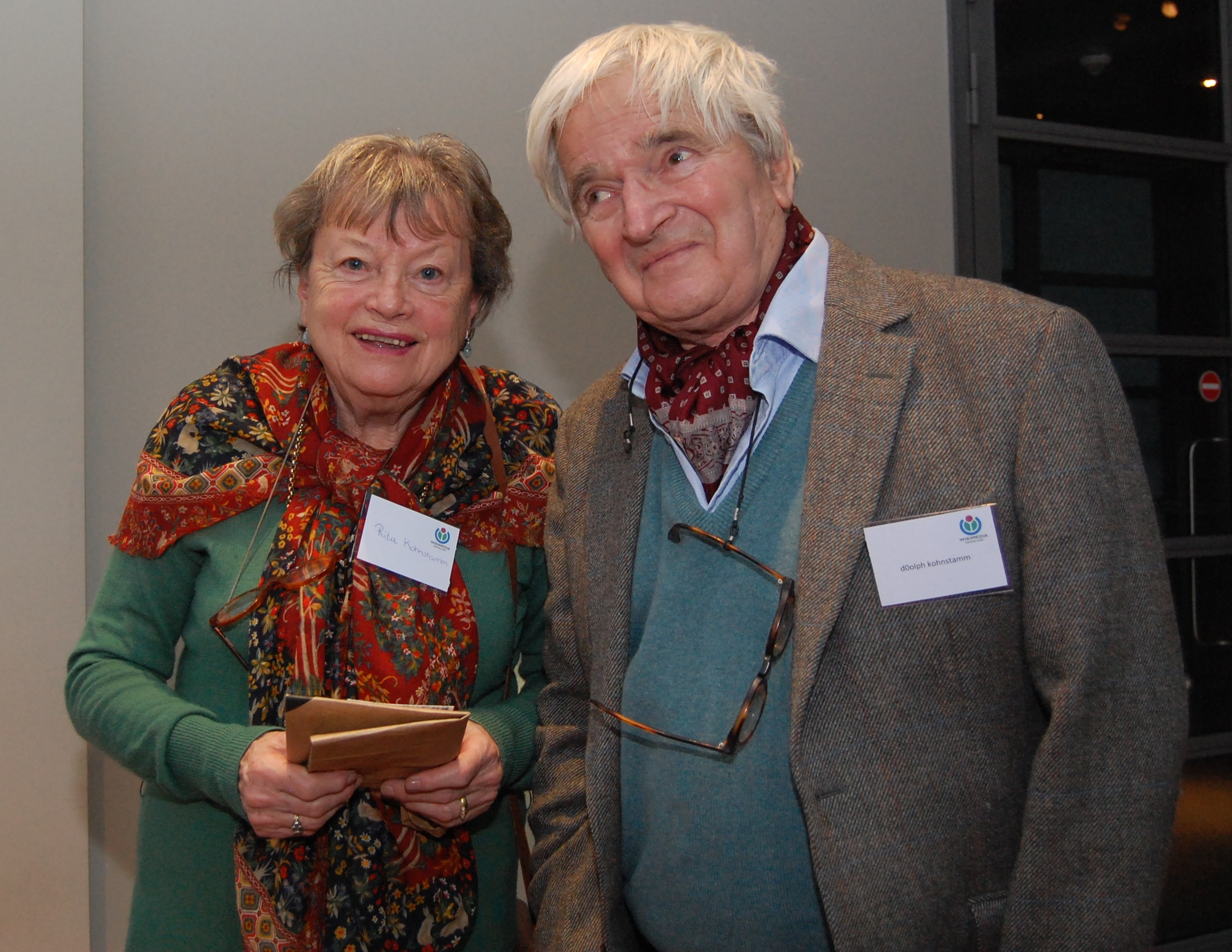 Nieuwjaarsbijeenkomst Wikimedia Nederland 21 januari 2017 Museum Volkenkunde Leiden, Rita Kohnstamm en Dolph Kohnstamm